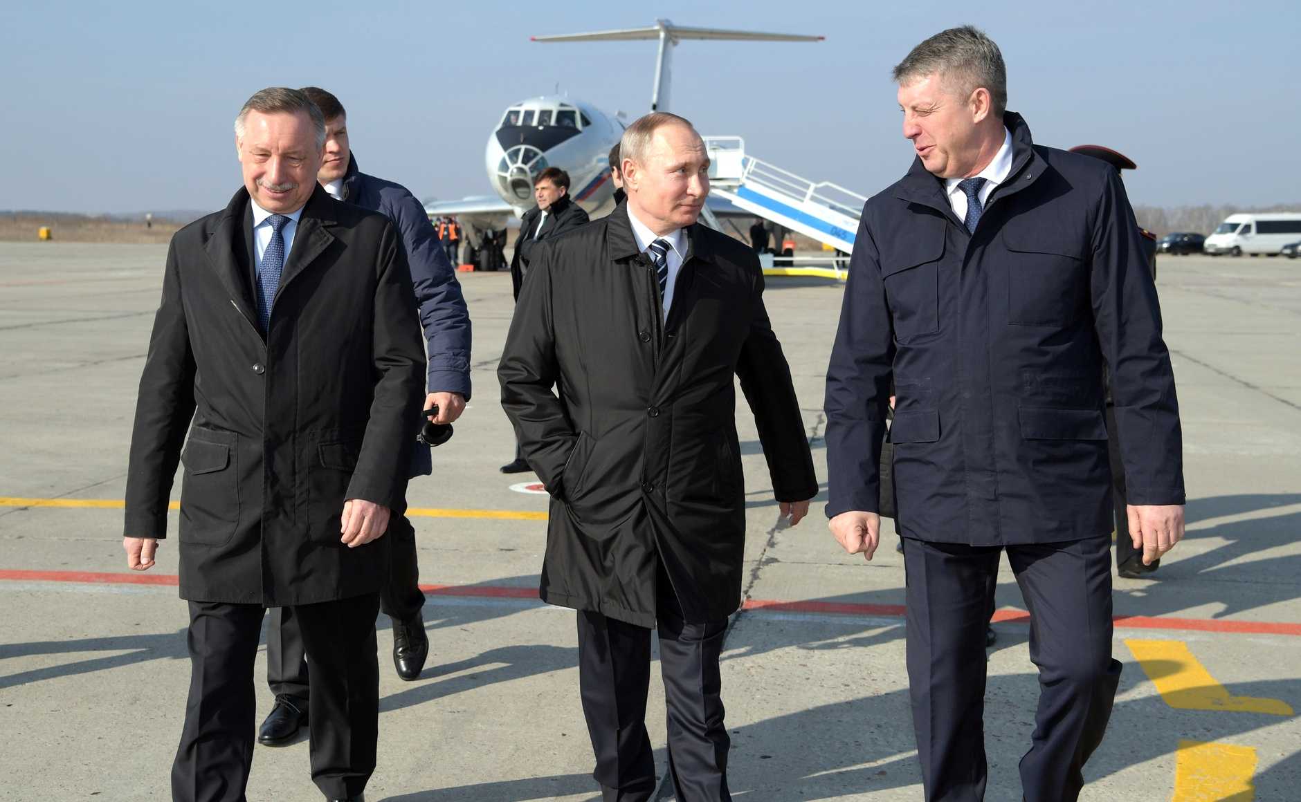 Александр Беглов, Владимир Путин и Александр Богомаз. Поездка Президента России в Брянскую область